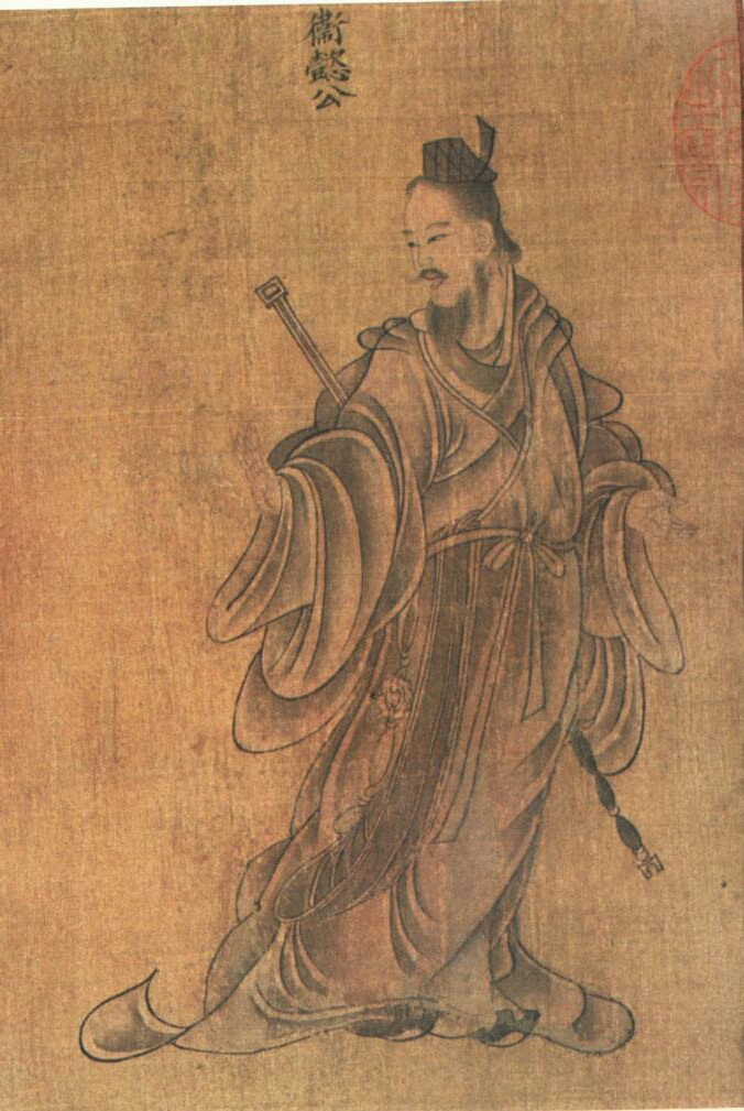 顧愷之《列女仁智圖》中的衛懿公